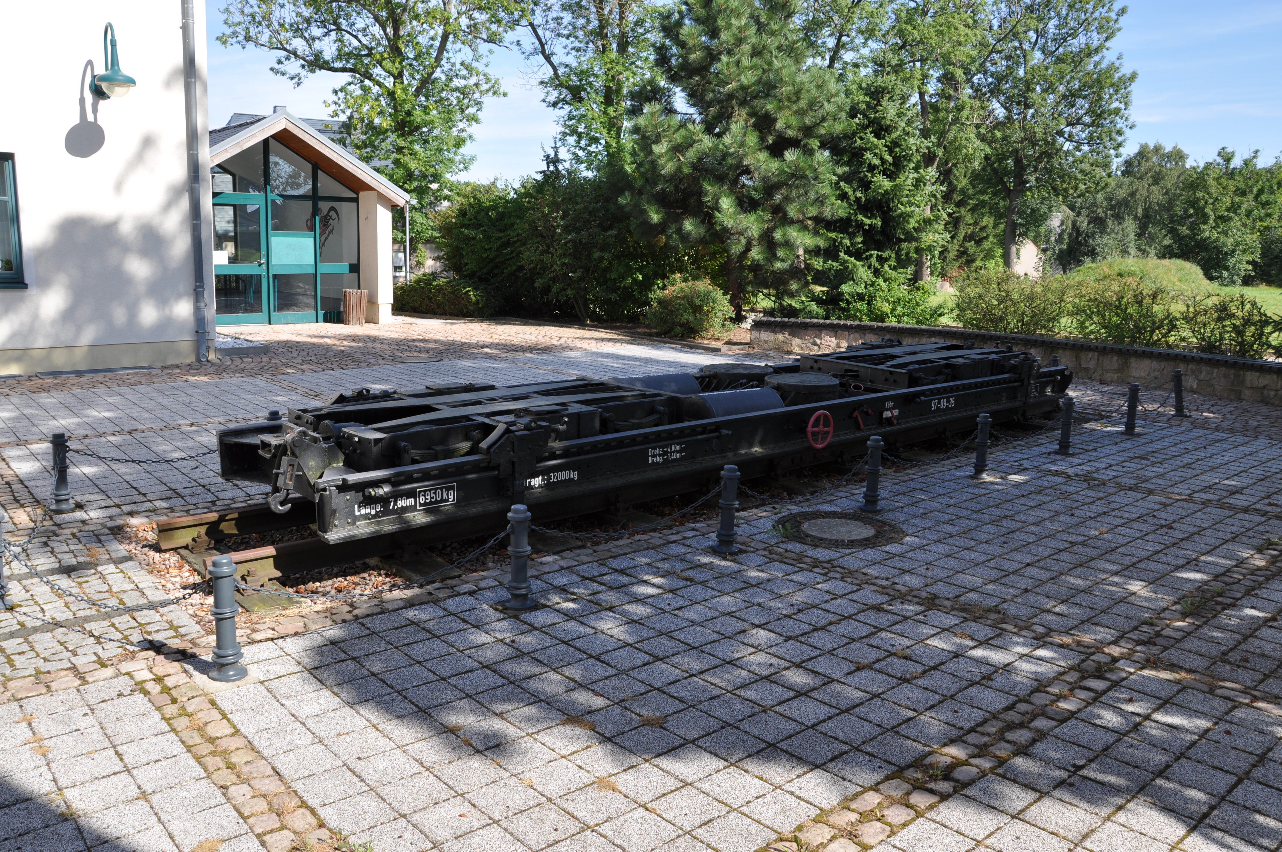 Rollwagen, als Denkmal auf dem Bahnhof Rothenkirchen (Vogtl)